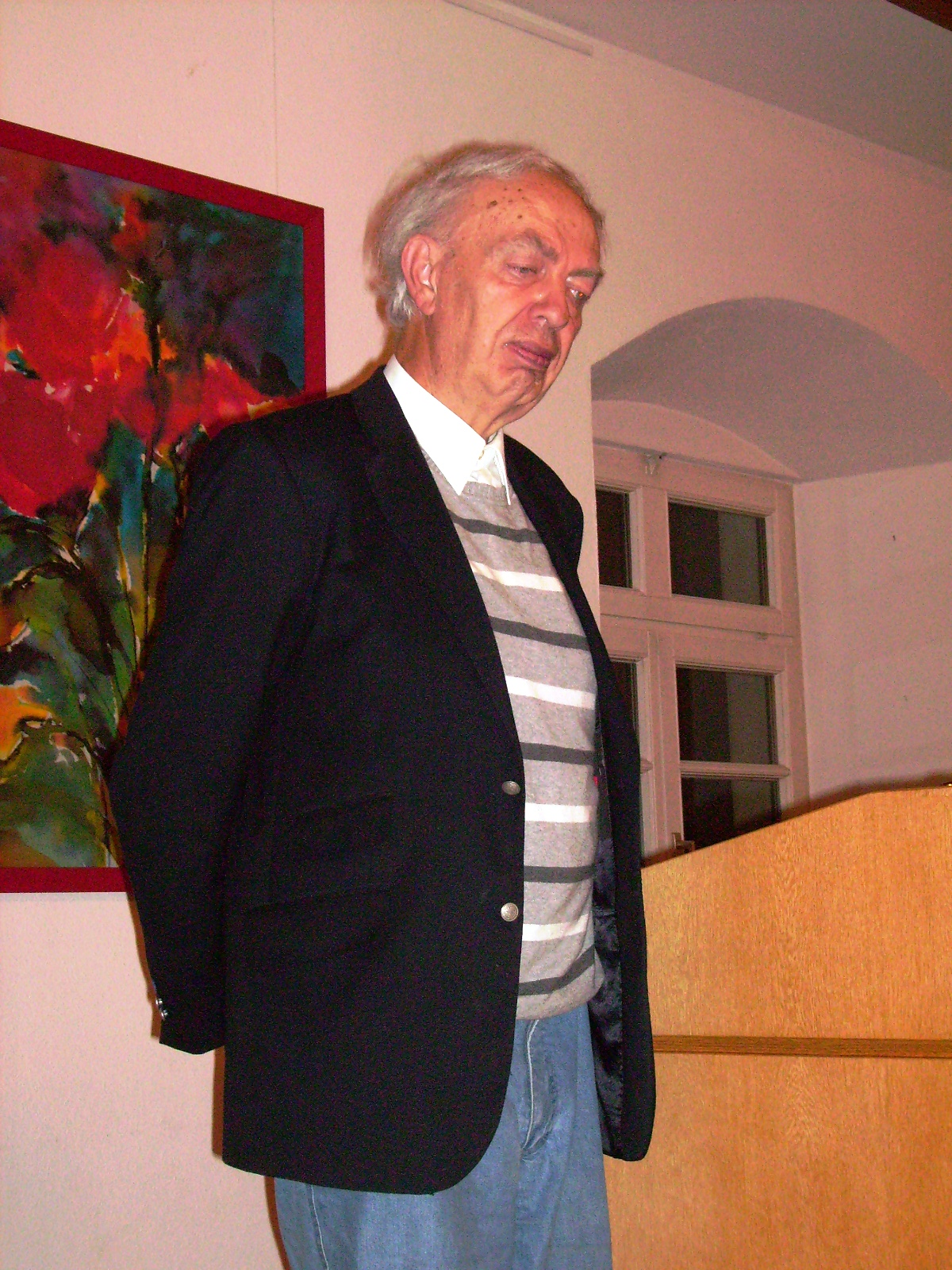 Klaus Berger am 3. März 2009 in Hechingen, Bildungshaus St. Luzen